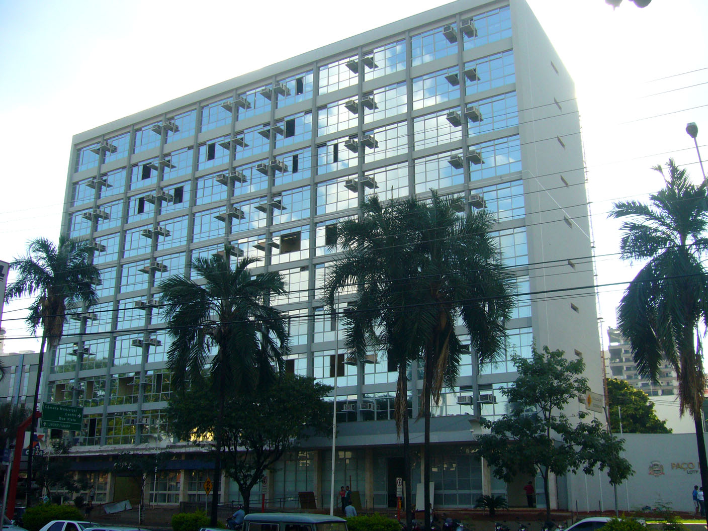 Foto da prefeitura em 12 de maio de 2009, após a reforma da fachada.